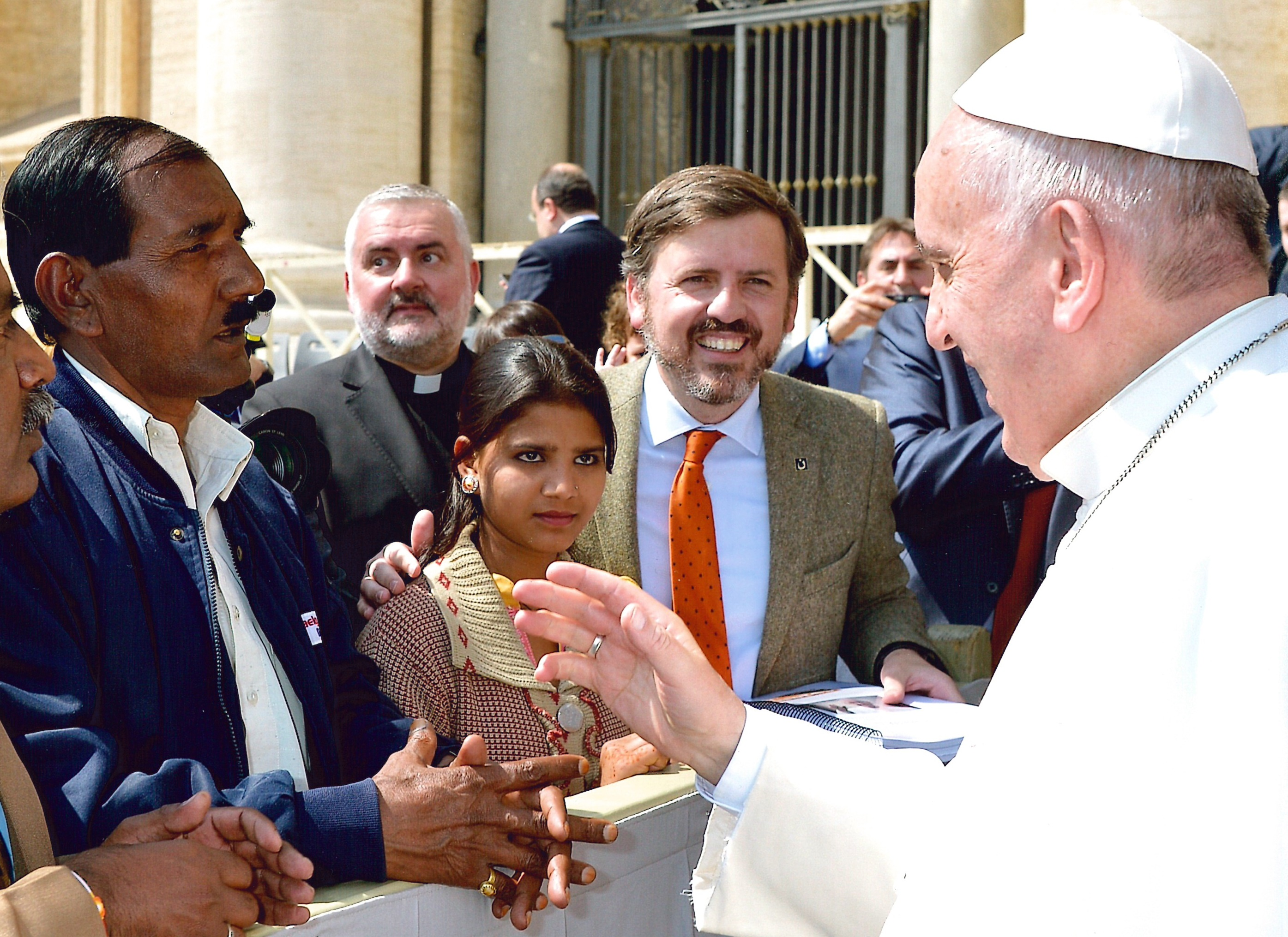 Le pape François avec l'époux et la fille d'Asia Bibi, sur la place Saint-Pierre, en avril 2015.